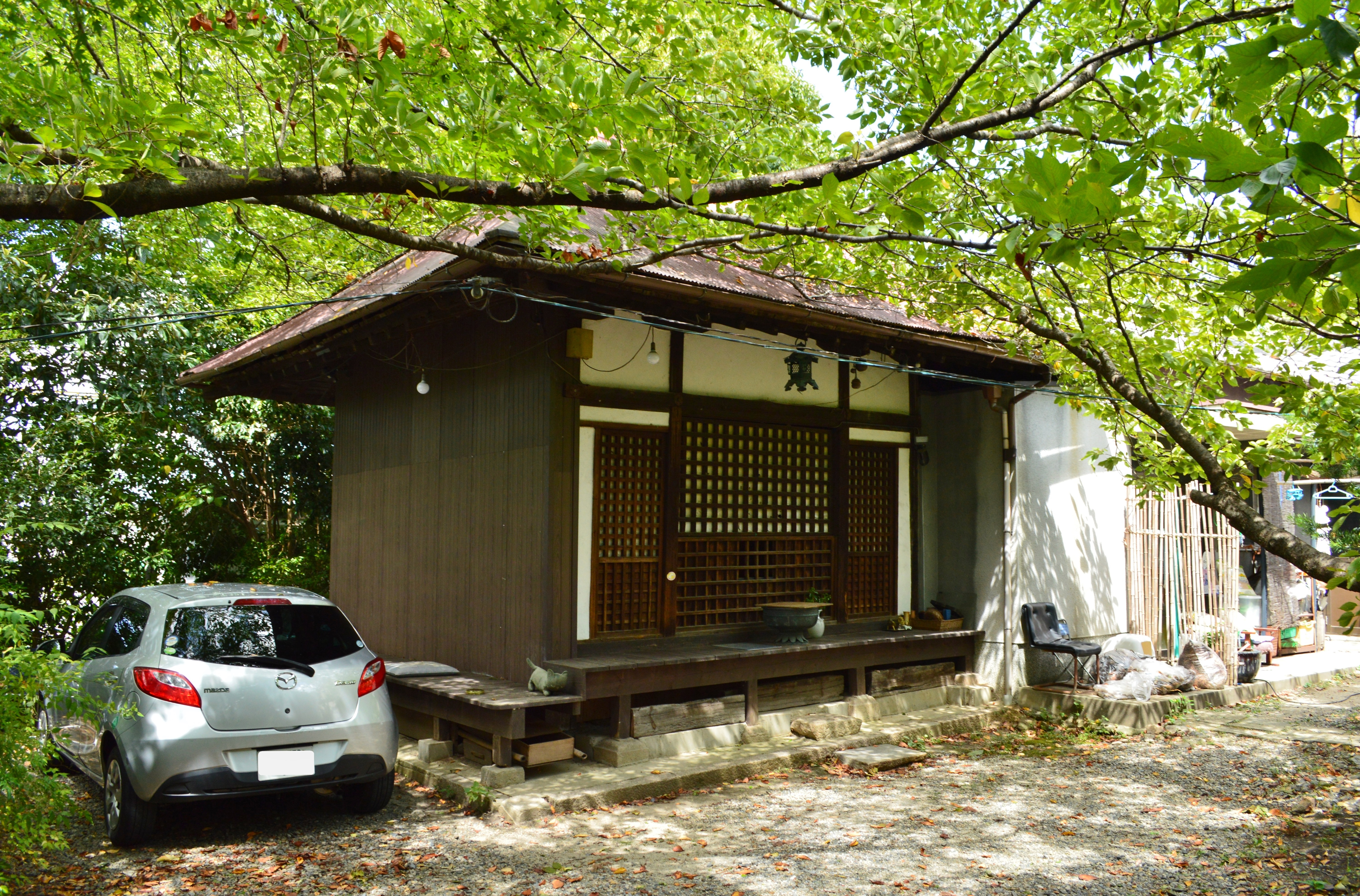 元興寺小塔院 堂